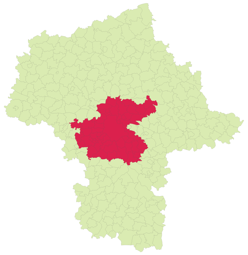 Warszawski Zespół Miejski. By Aotearoa